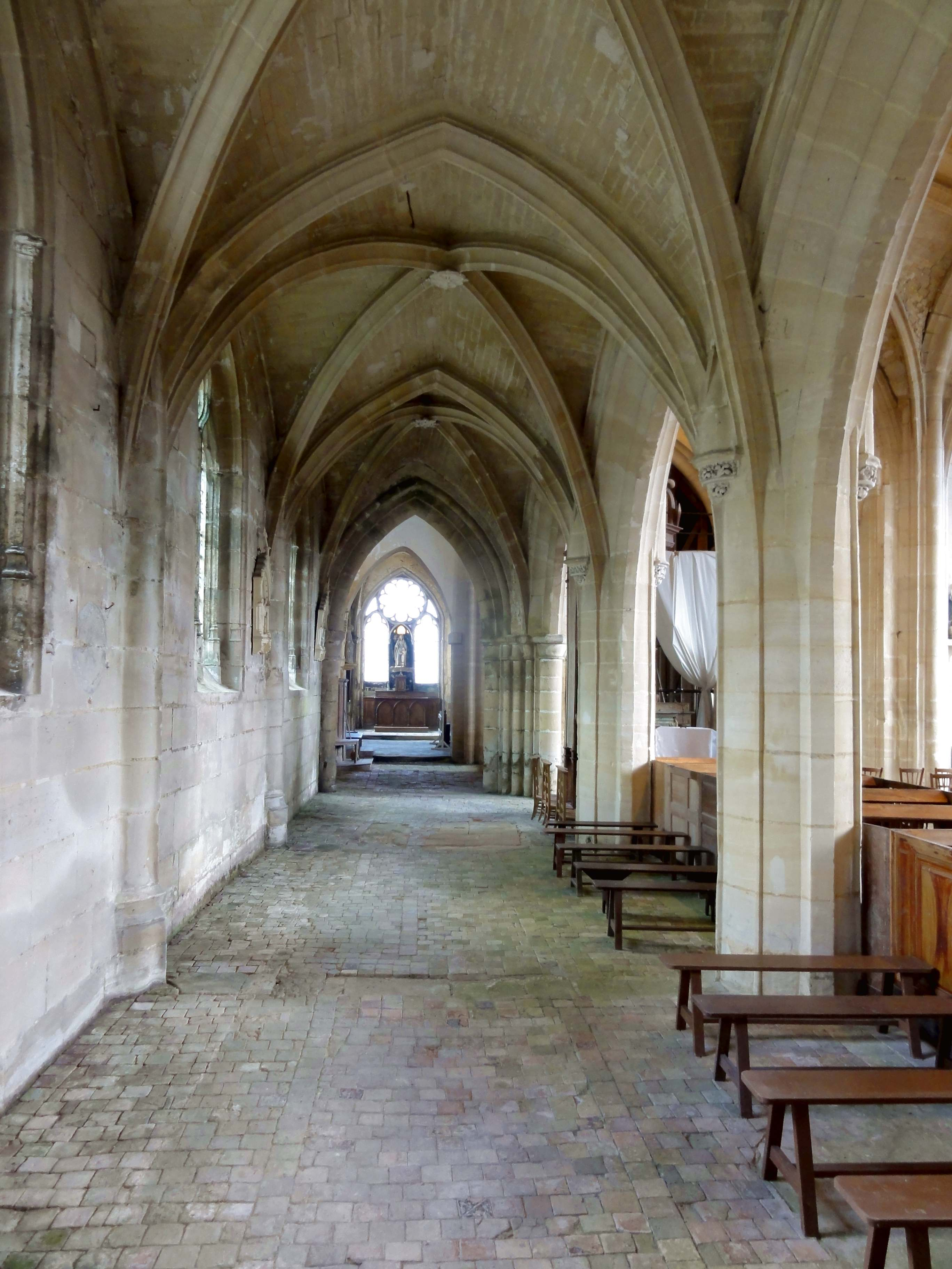 Intérieur de l'église - voir le titre du fichier.